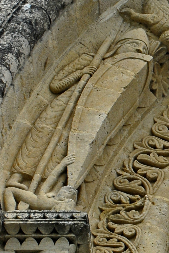 St.-Pierre Aulnay, Detail Archivoltenfenster über Südportal